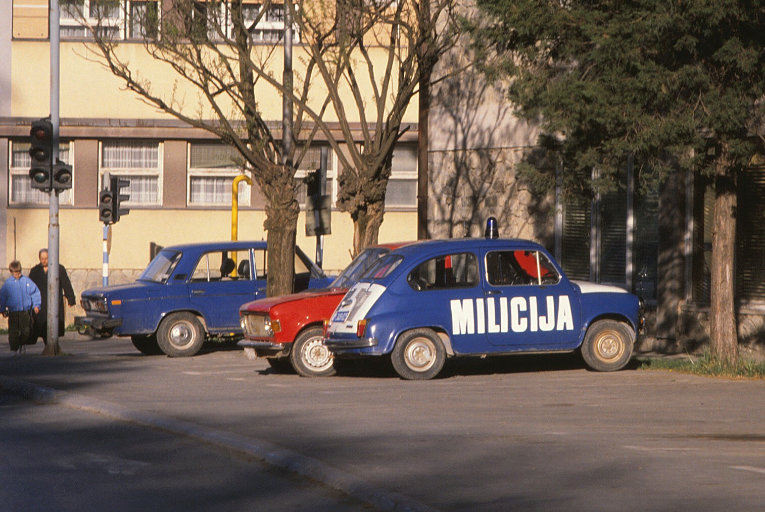 Zastava 750 or 850 of Milicija in Yugoslavia. Police car in (former) Yugoslavia